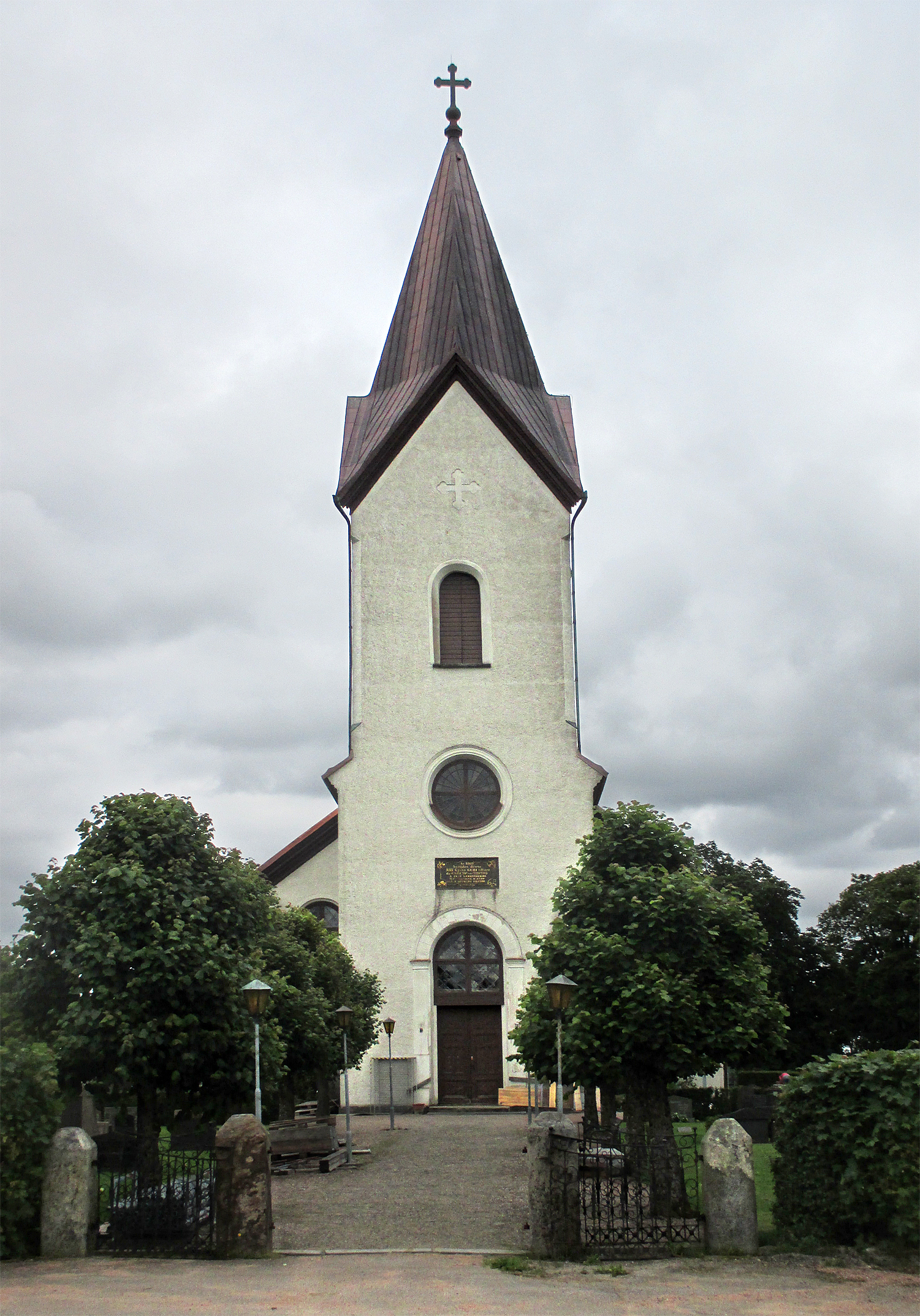 Ås kyrka i Ås socken, Västbo härad, Finnveden, Småland, Sverige. Kyrkan ligger i Gisslaveds kommun i Jönköpings län. Kyrkan tillhör Västbo S:t Sigfrids församling, Östbo-Västbo kontrakt, Växjö stift. Kyrkan invigdes 1870.